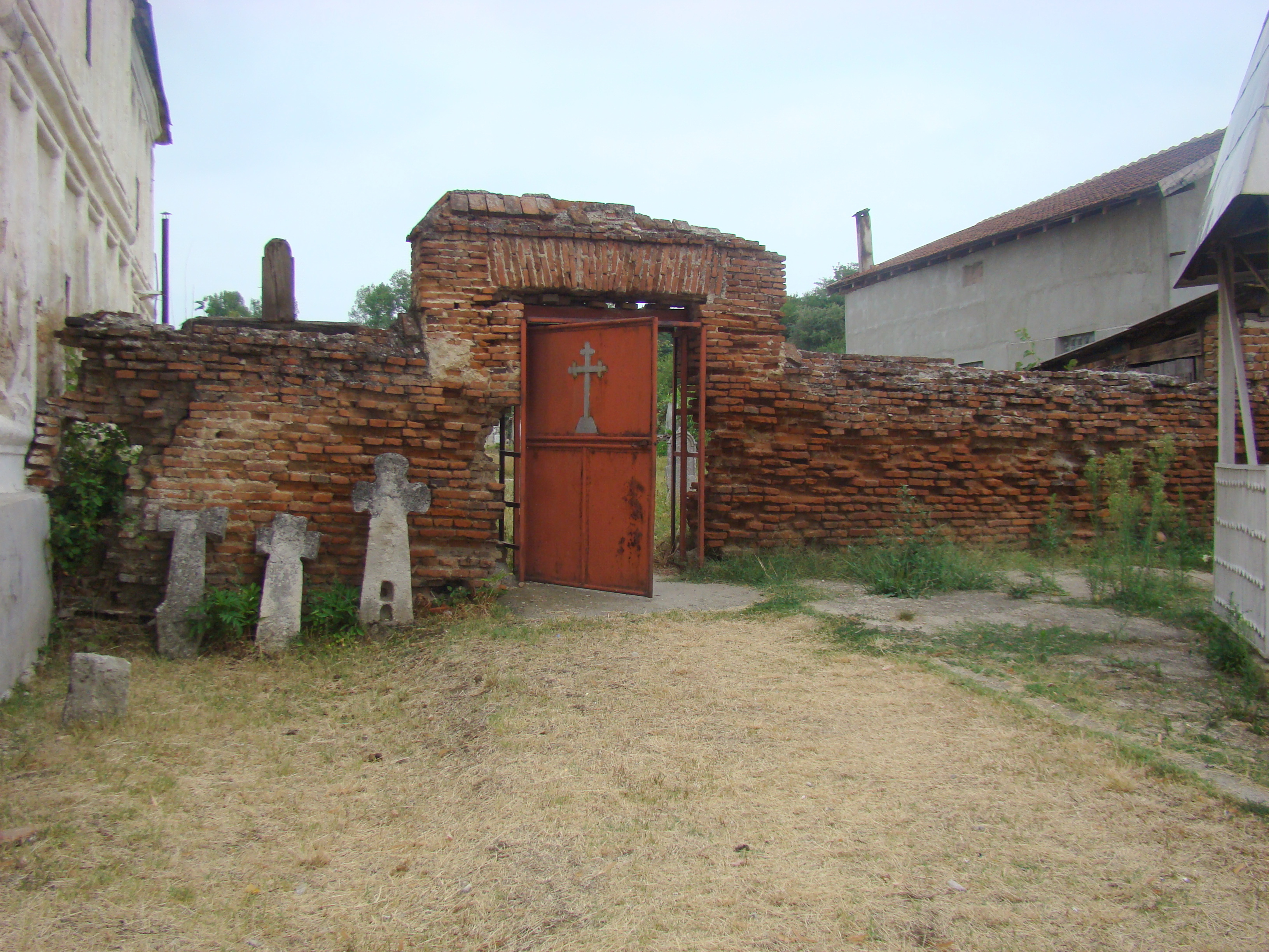 Zid de incintă, sat Cerneți; comuna Șimian